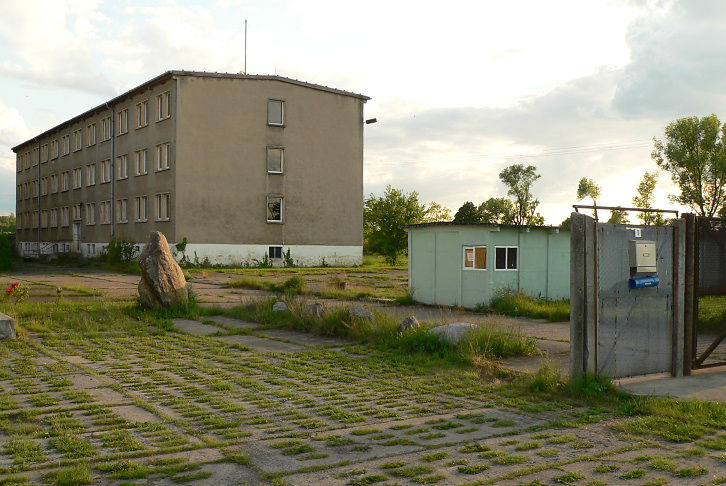 Ehemalige Grenztruppenkaserne in Oebisfelde-Buchhorst